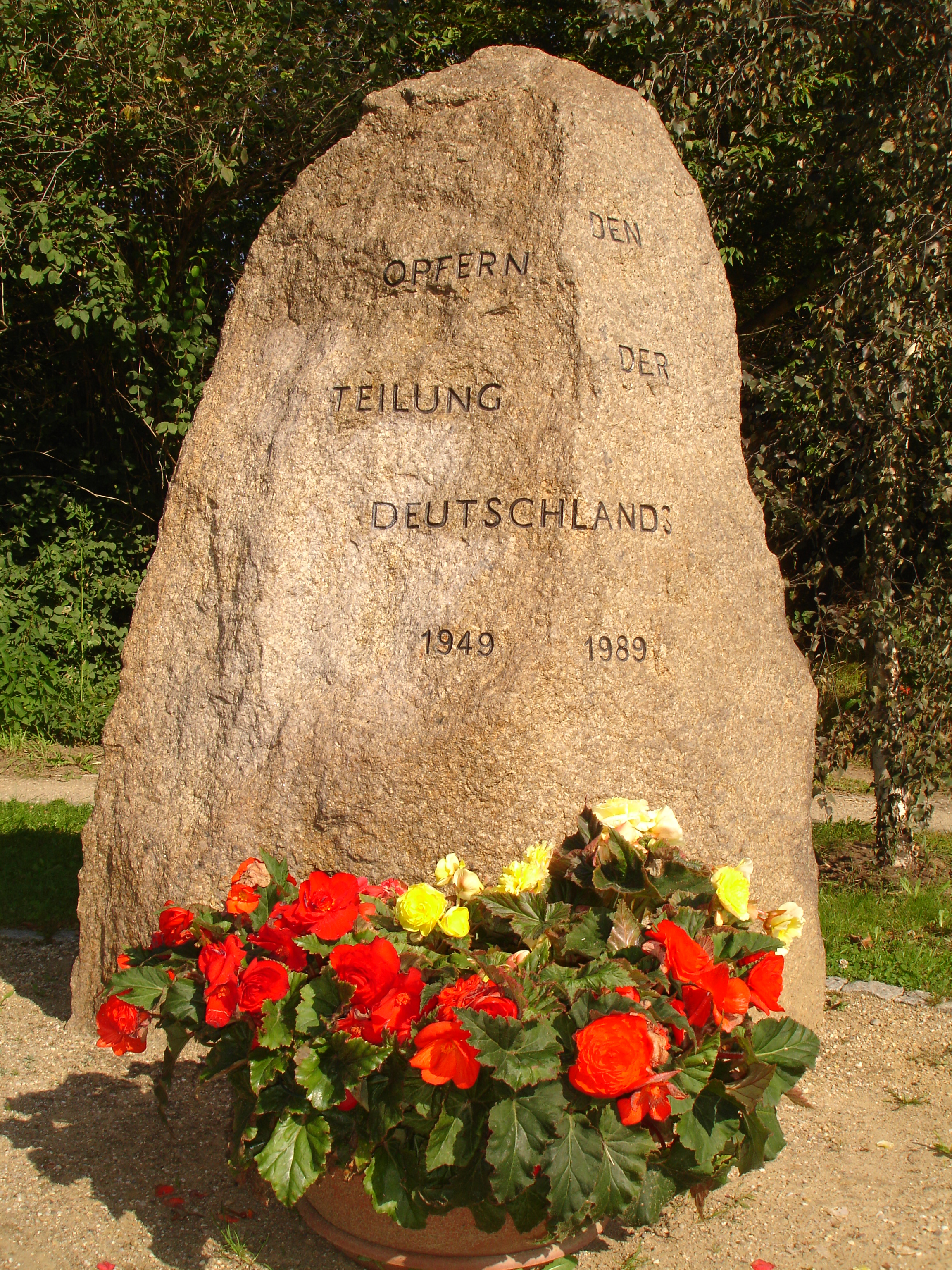 Kleinmachow Gedenkstein für Opfer der deutschen Teilung am Adam-Kuckhoff-Platz; Kleinmachnow memorial stone for victims of the german division